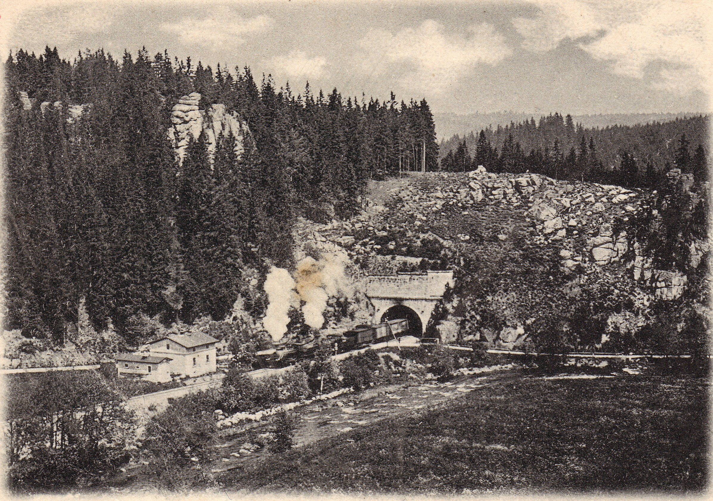 Schönheiderhammer: Ein Zug mit Doppeltraktion der Chemnitz–Aue–Adorfer Eisenbahn verlässt den Tunnel östlich von Schönheiderhammer, im Vordergrund die Zwickauer Mulde. Aufnahme von etwa 1900. Heute befindet sich in diesem Bereich die zur Talsperre Eibenstock gehörende Vorsperre Schönheiderhammer. Hier kann man die gleiche Stelle im Anfang des 21. Jahrhunderts sehen:[1], abgerufen am 3. November 2015.